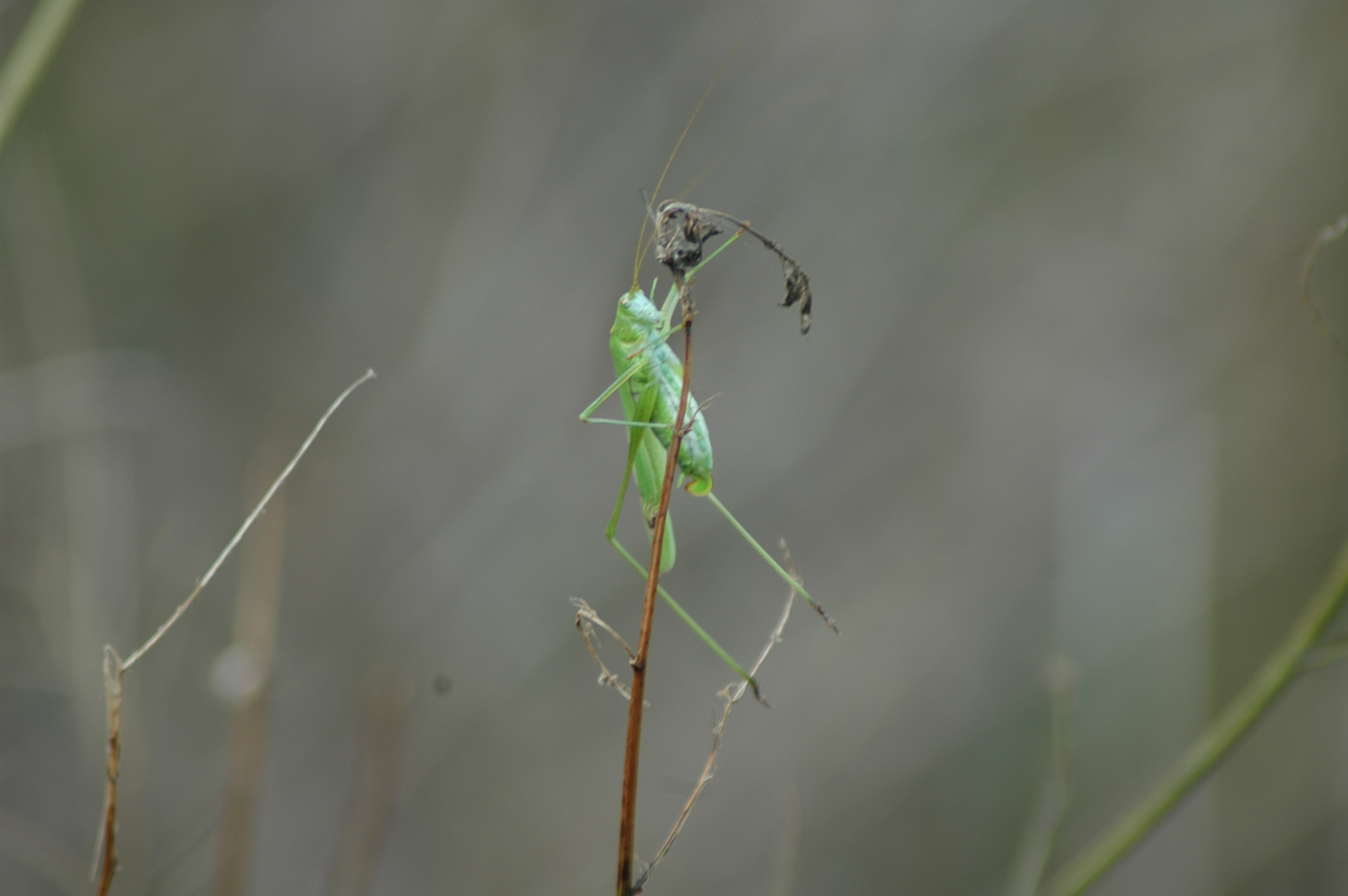 Femelle de phanéroptère commun